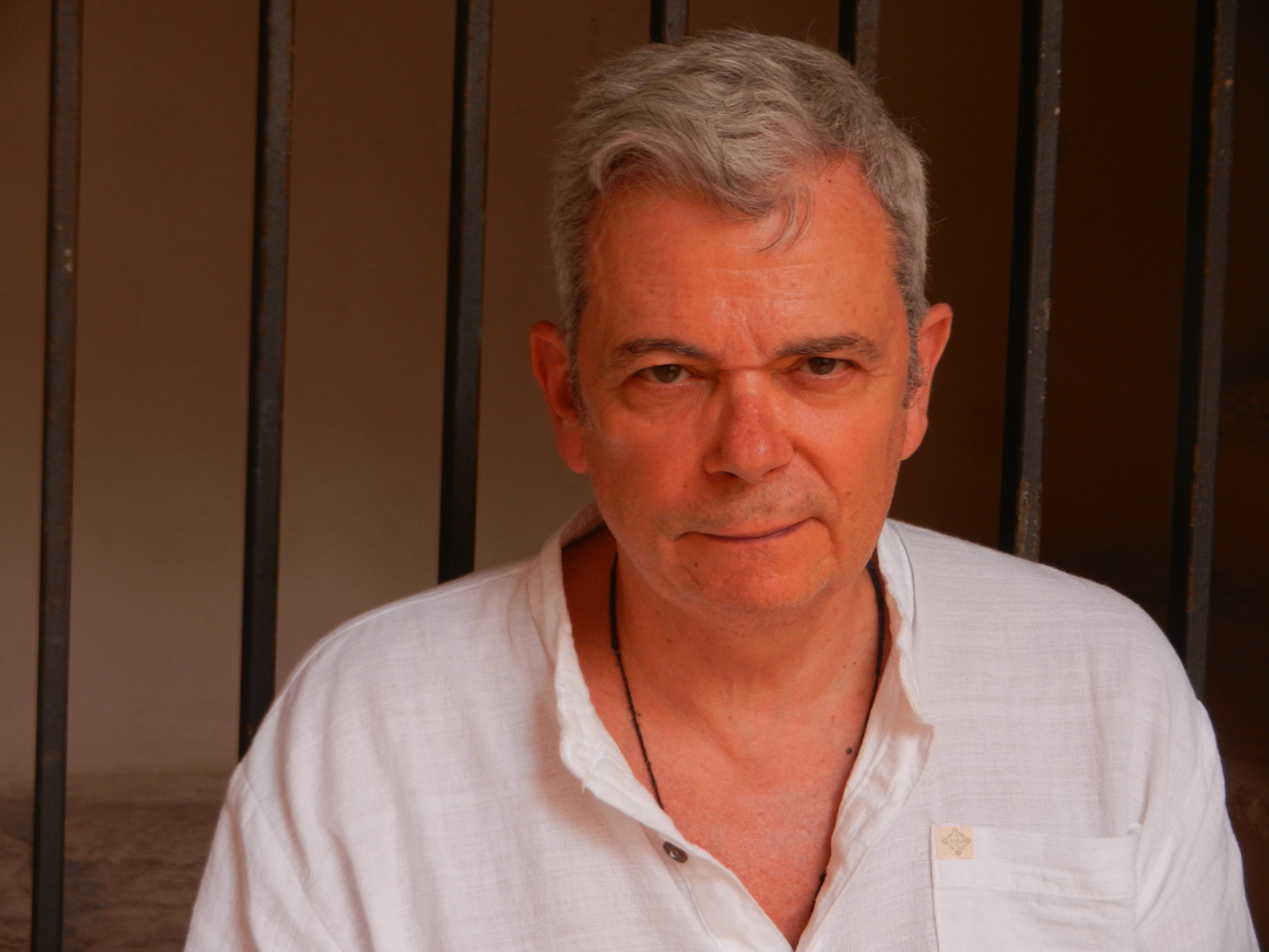 Photo de l'auteur